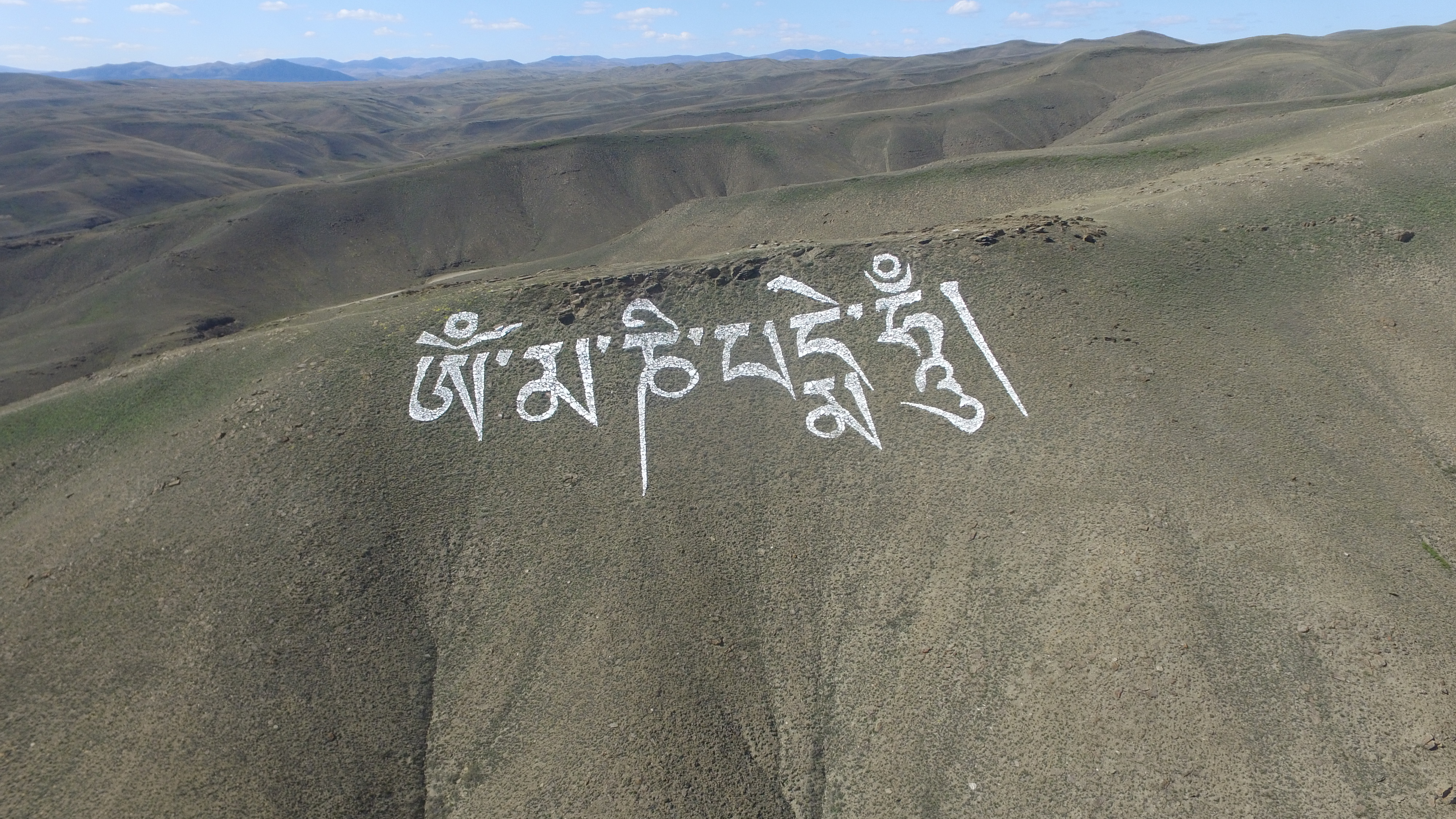 "Ом мани падме хум" на горе Дөгээ